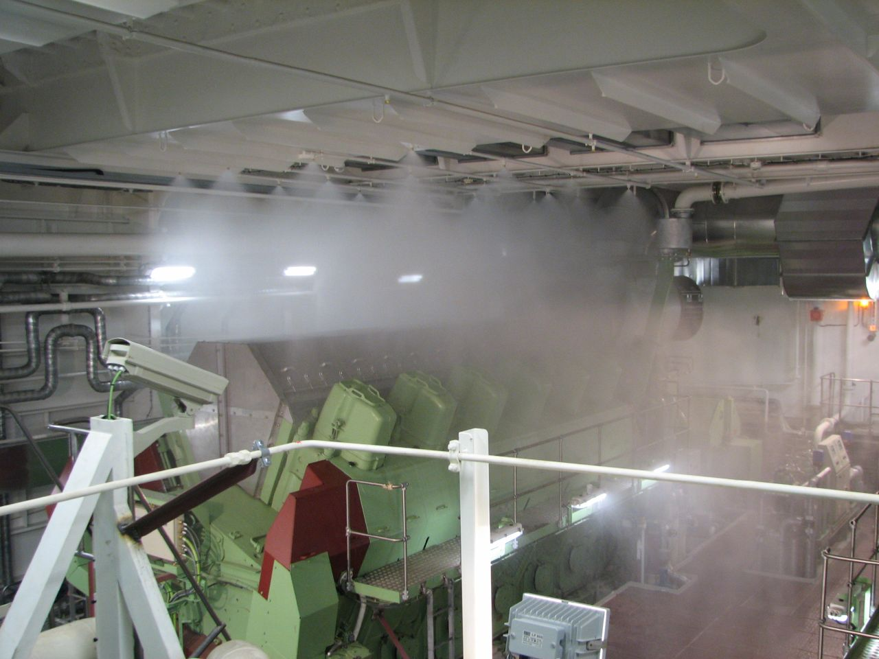 Flensburger Schiffbau Gesellschaft